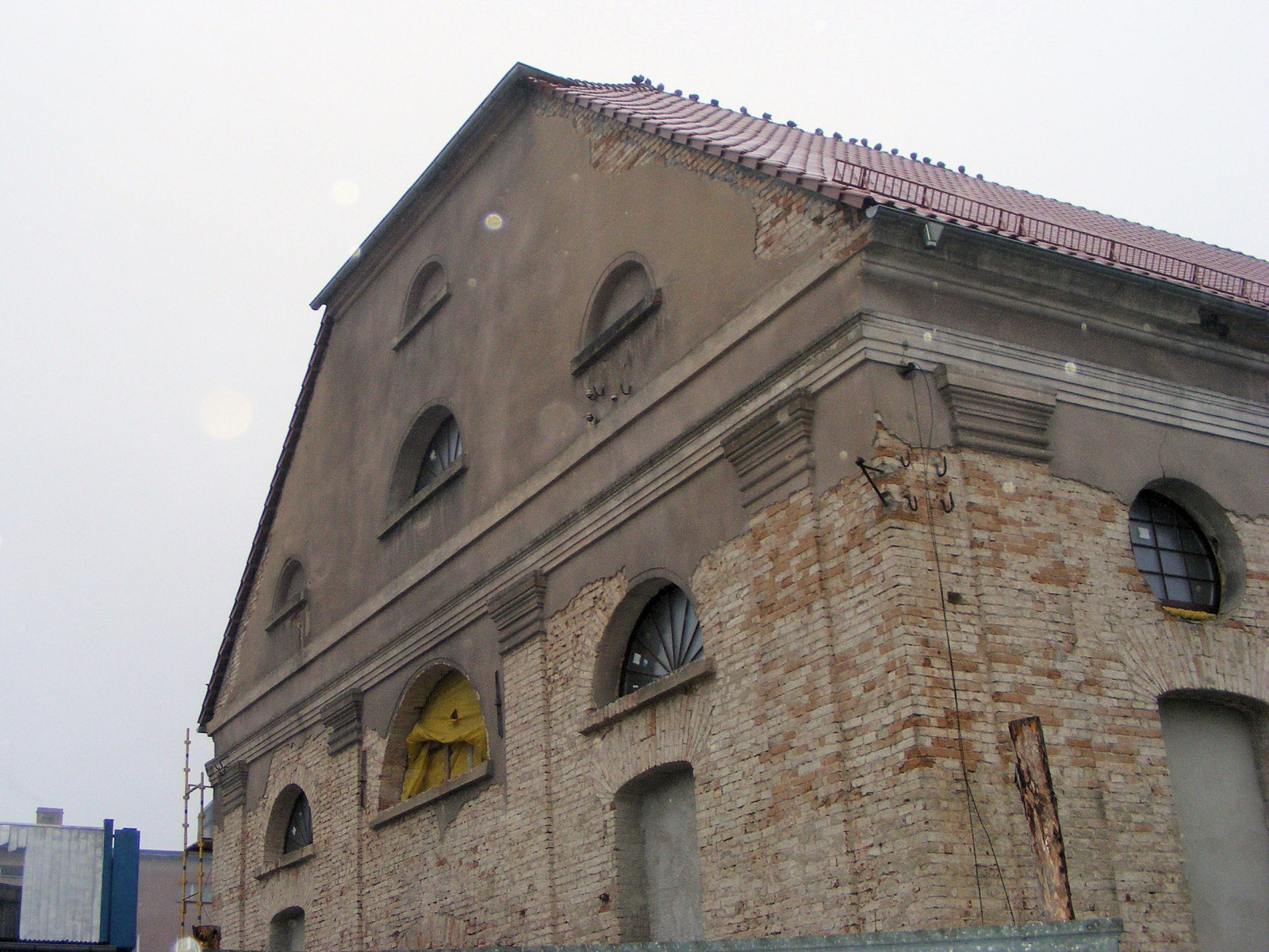 Remontowany budynek synagogi w Międzyrzeczu - woj. lubuskie, Poland